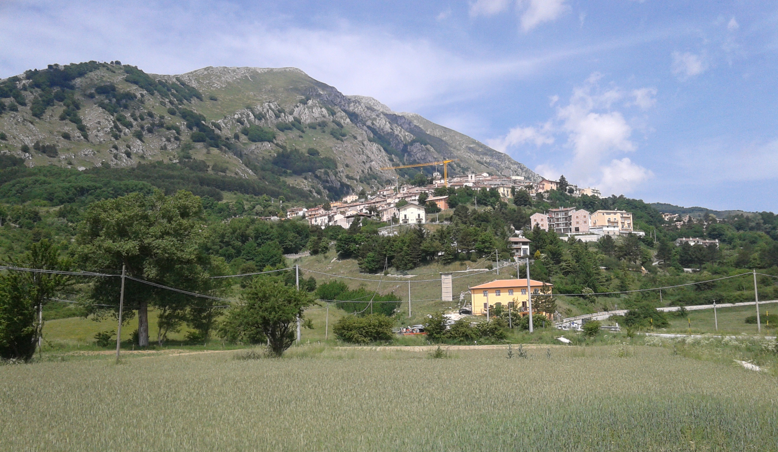 Foto panoramica di Rocca di Cambio